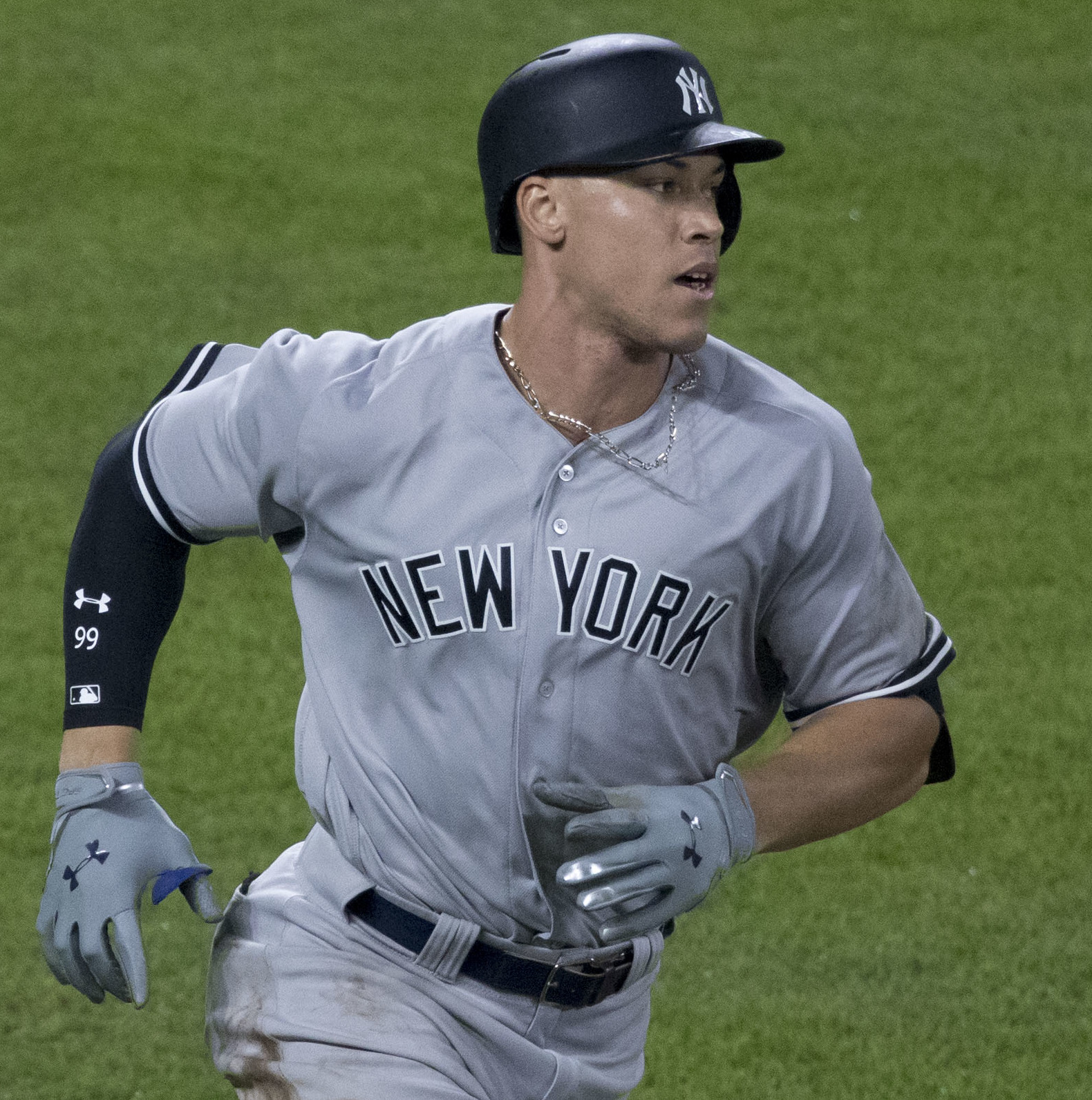 Yankees at Orioles 9/5/17